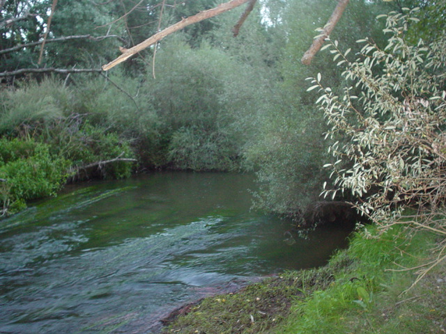 Vista del Río Adaja a su paso por Villanueva de Gómez, Ávila (España), paraje La Rinconada